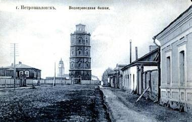 Водонапорная башня Петропавловске